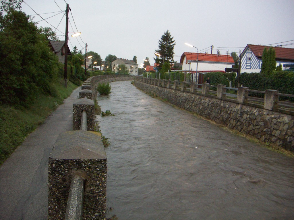 Liesing nach starken Regen, vom Bach zum reißenden Fluss 001